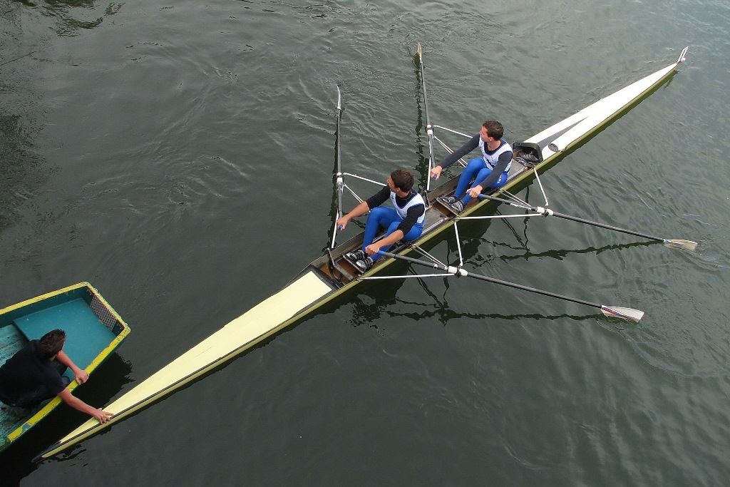 Dvojni dvojec na startu Sprint regate na Ljubljanici, Ljubljana, Slovenija